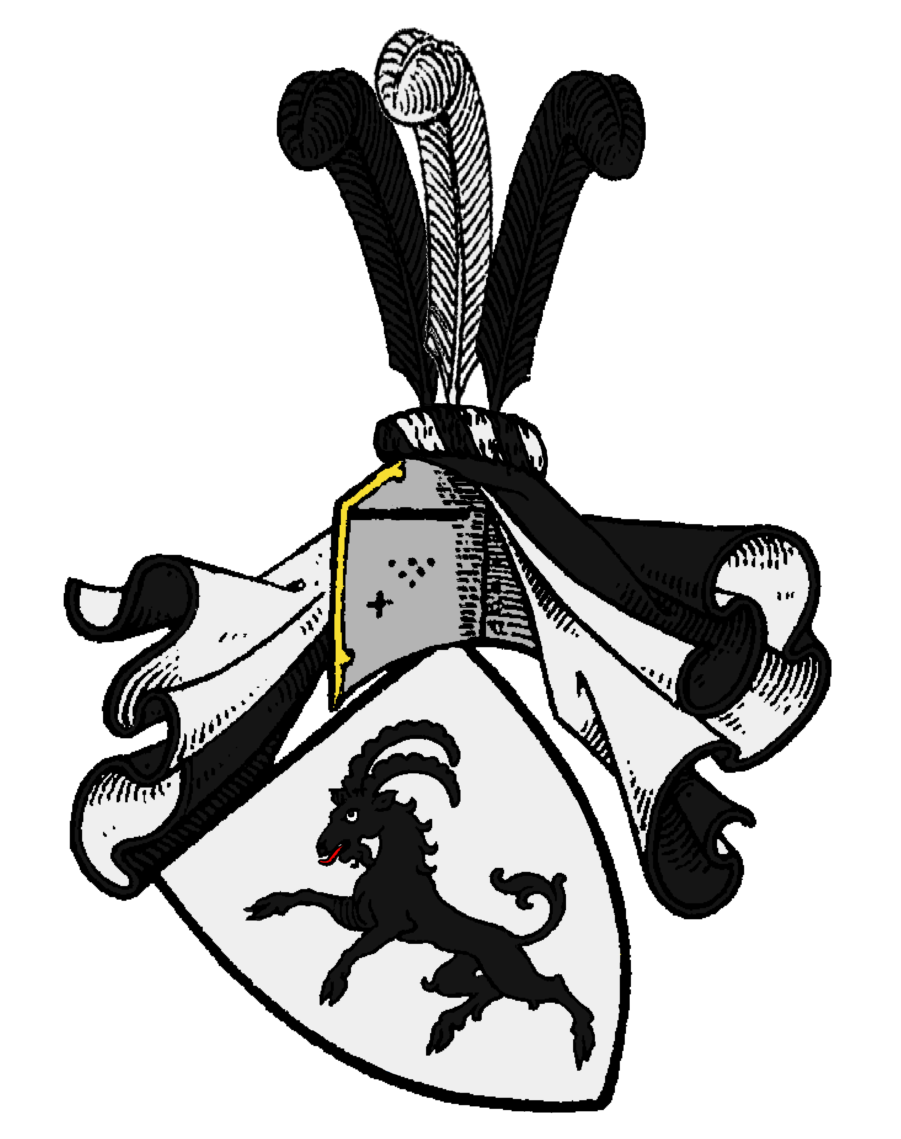 Wappen der uradligen v. Bennewitz (Benewitz; Beynewitz)